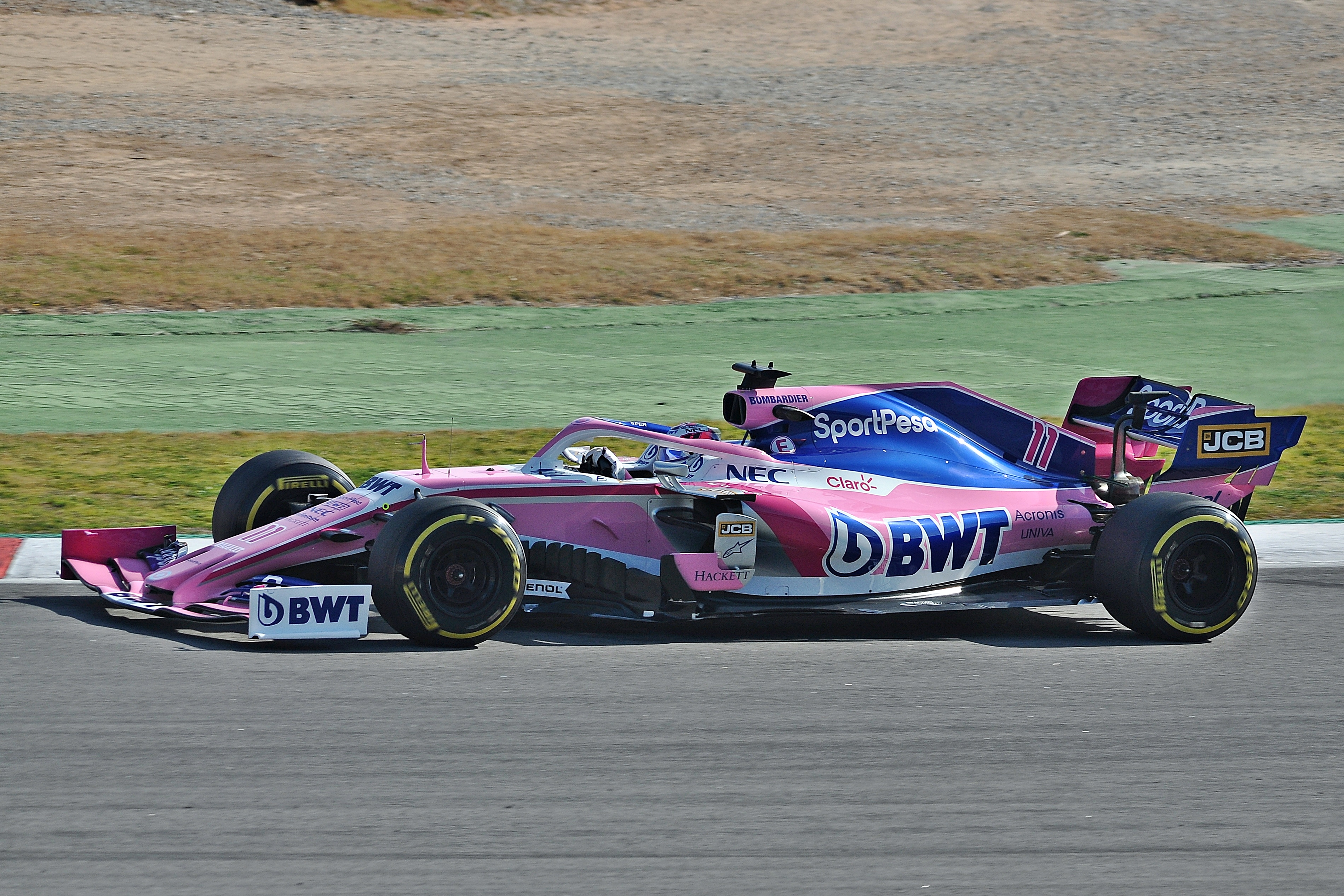 Tets Days-Circuito de Catalunya